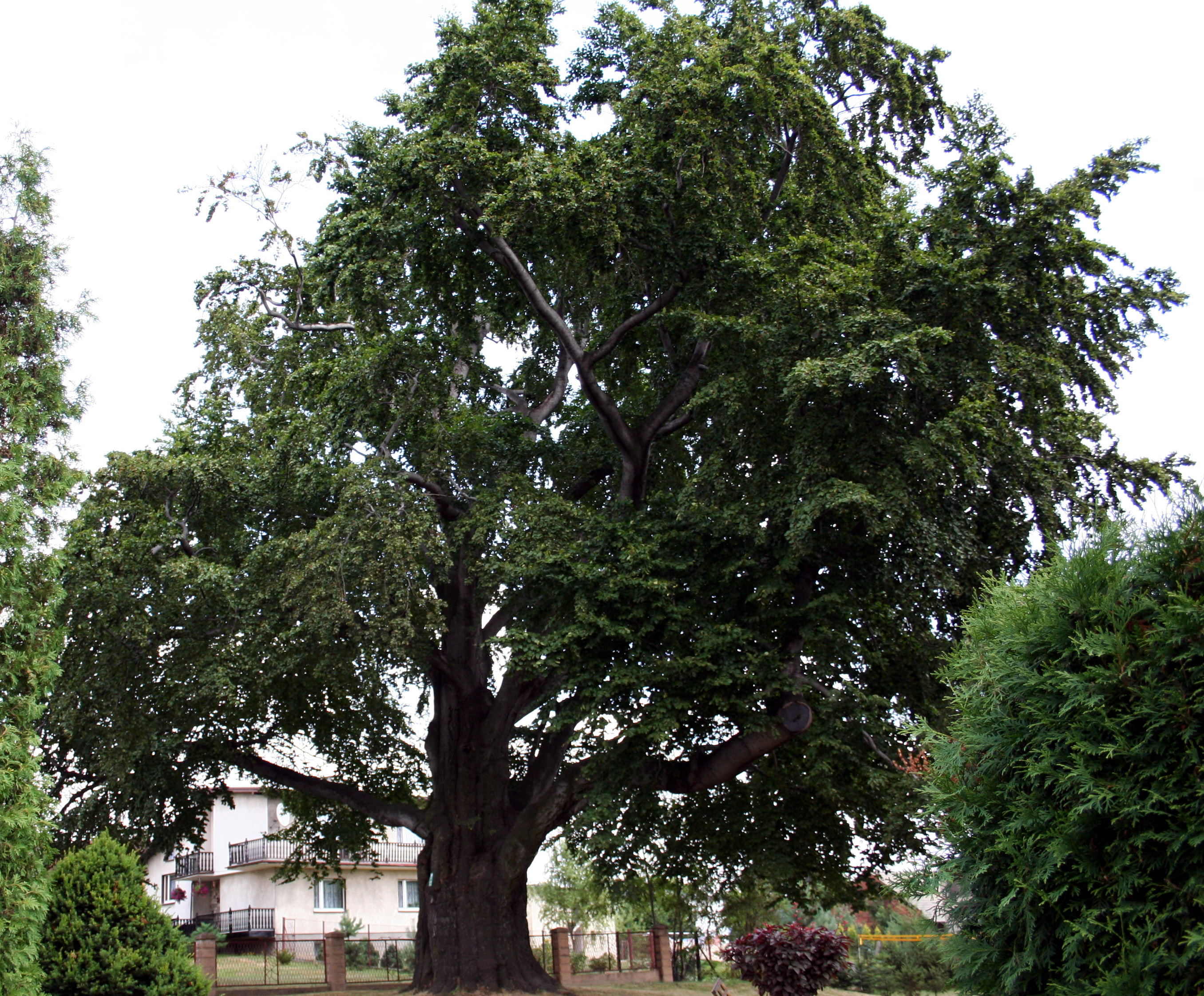 kilkusetletni buk w Świerklanach Górnych - "Buk Sobieskiego"